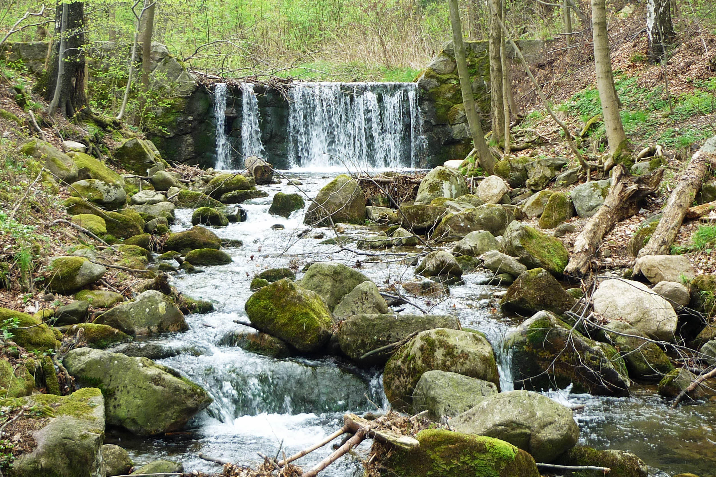 Plagnitz-Wasserfall im Eulengrund in Krummhübel (Karpacz) im Riesengebirge